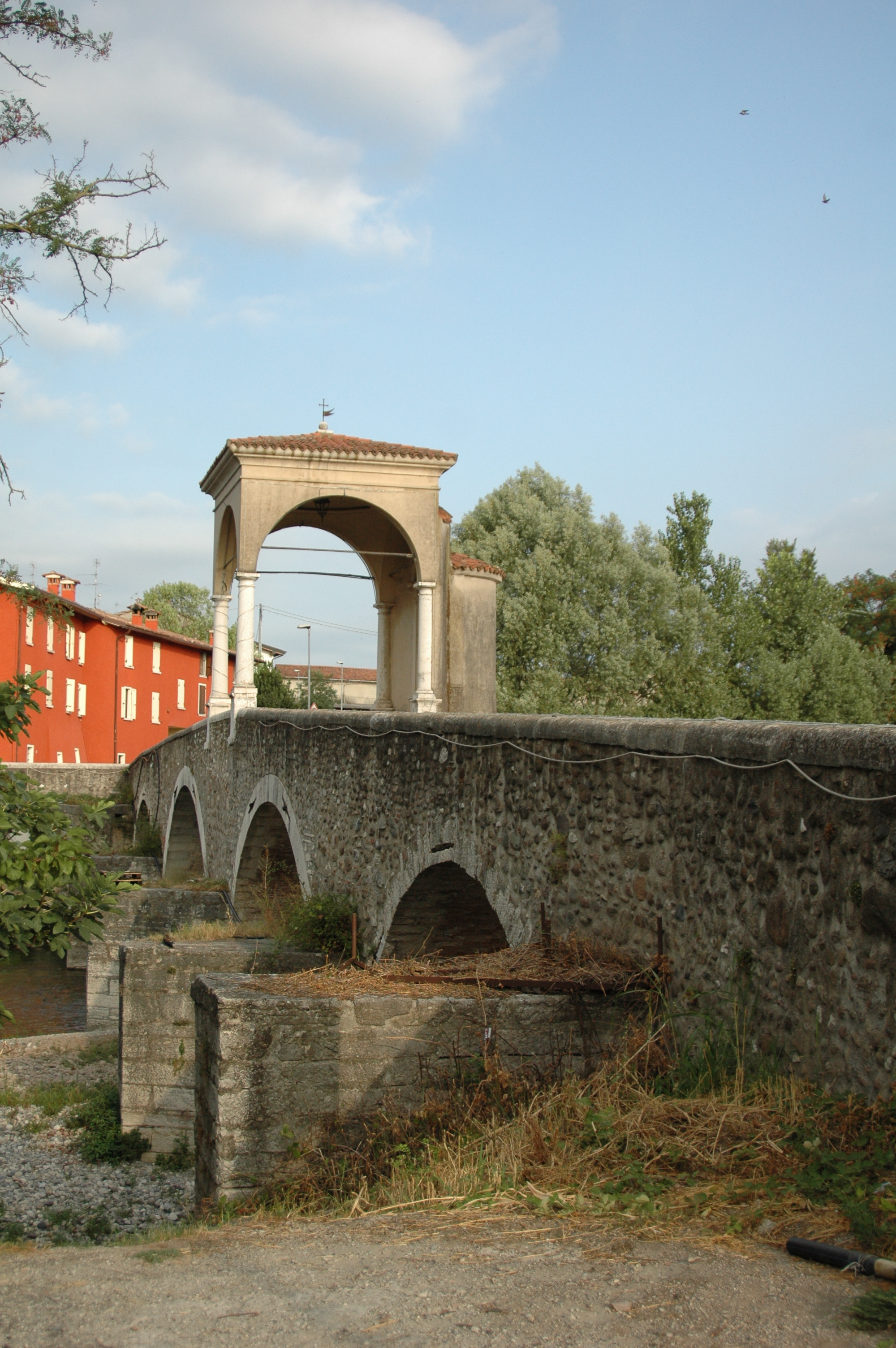 Il ponte di Pontenove (Bedizzole, Italia)